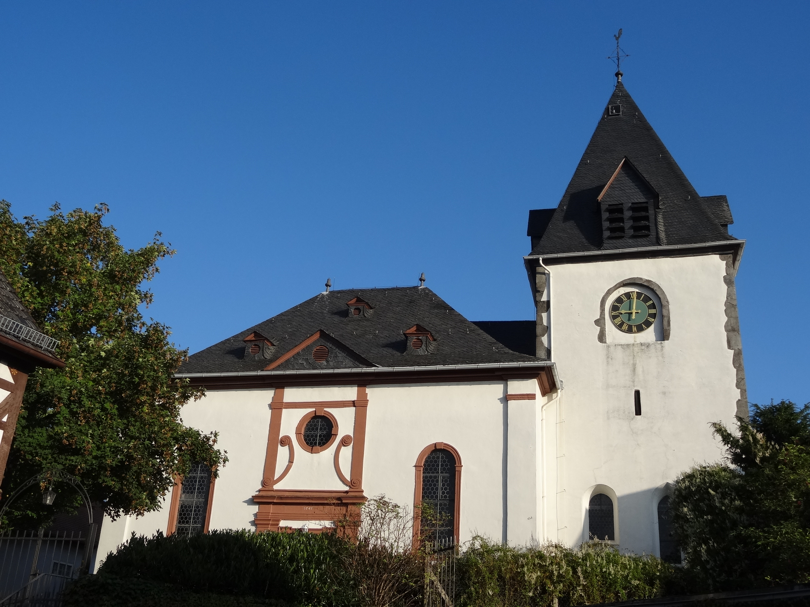 Evangelische Kirche Bettenhausen (Lich)